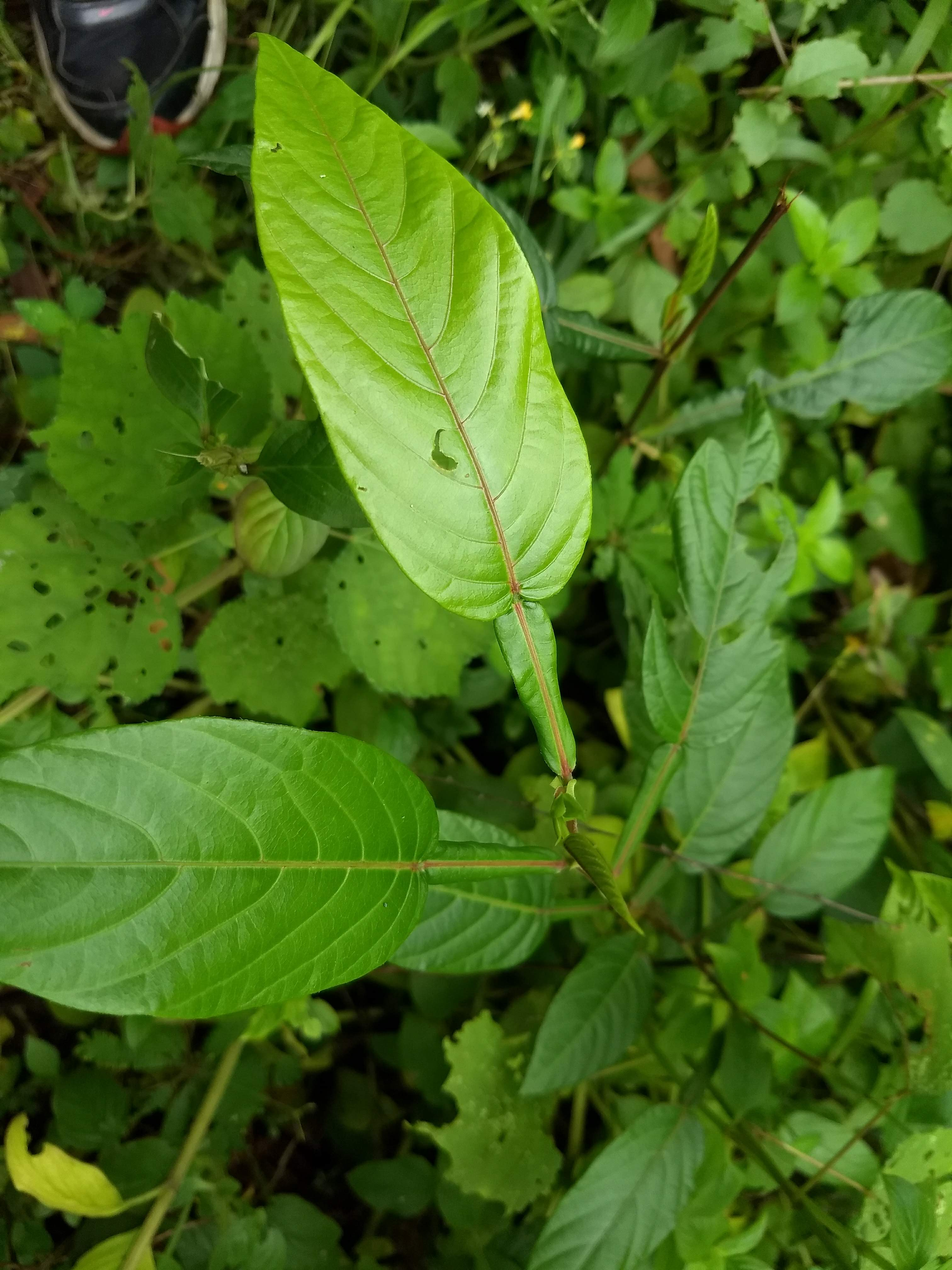 desmodium triquetrum. From Eranakulam